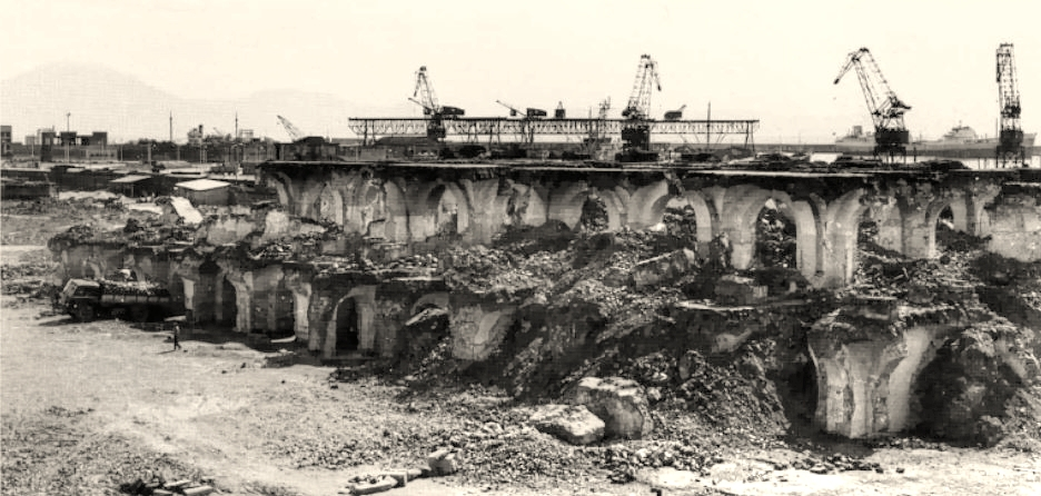 Palazzo dei Granili in fase di abbattimento.